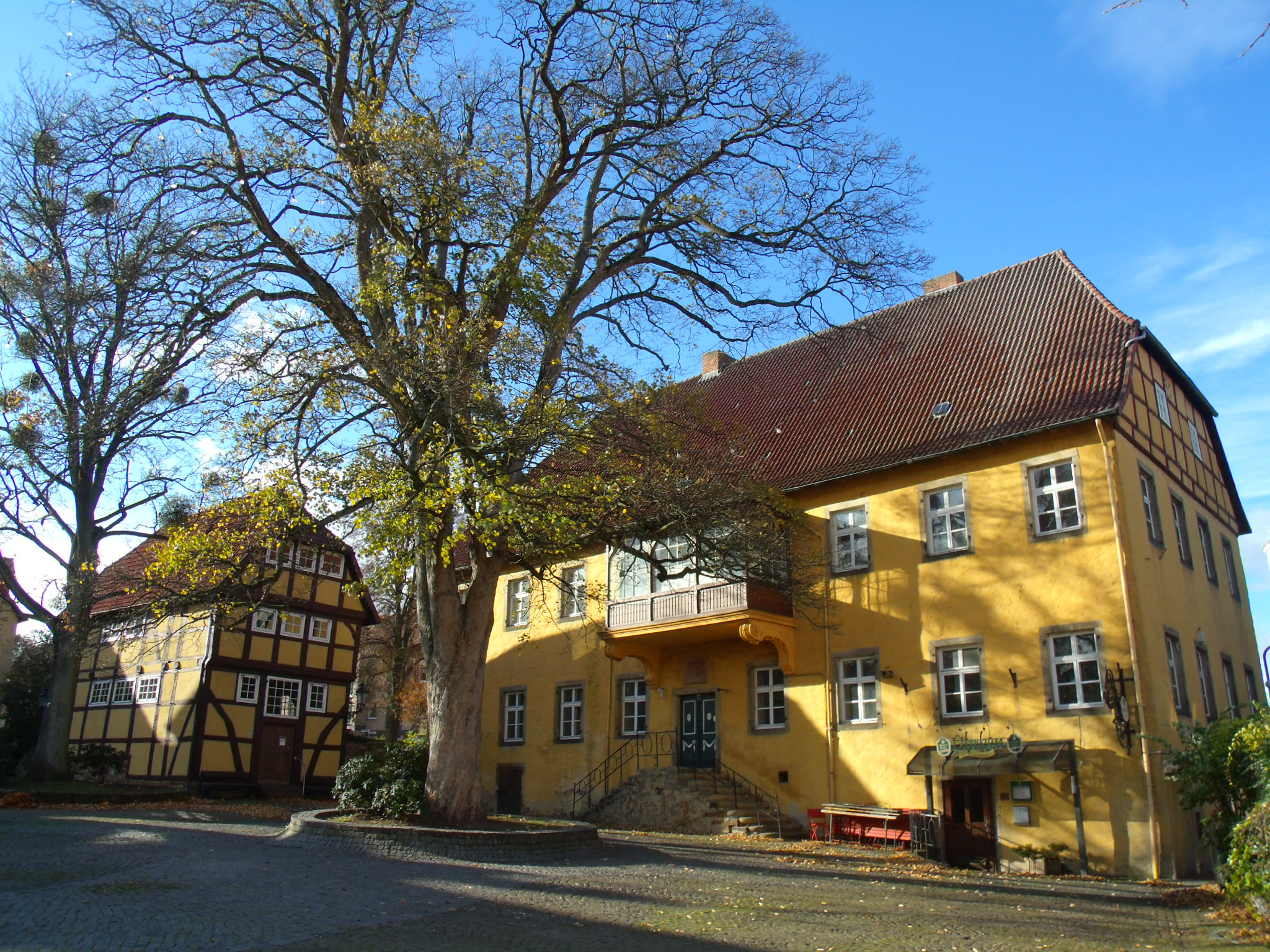 Der Burgmannshof am Markt war ursprünglich Sitz des ritterbürtigen Geschlechts von Sloen. Der Hof war mindisch-bischöfliches Lehen, wie es der bischöfliche Wappenstein an der Nordwand der Ummauerung belegt This image shows a heritage building in Germany, located in the North Rhine-Westphalian city Lübbecke (no. 017).